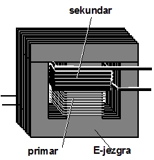 Građa monofaznog transformatora